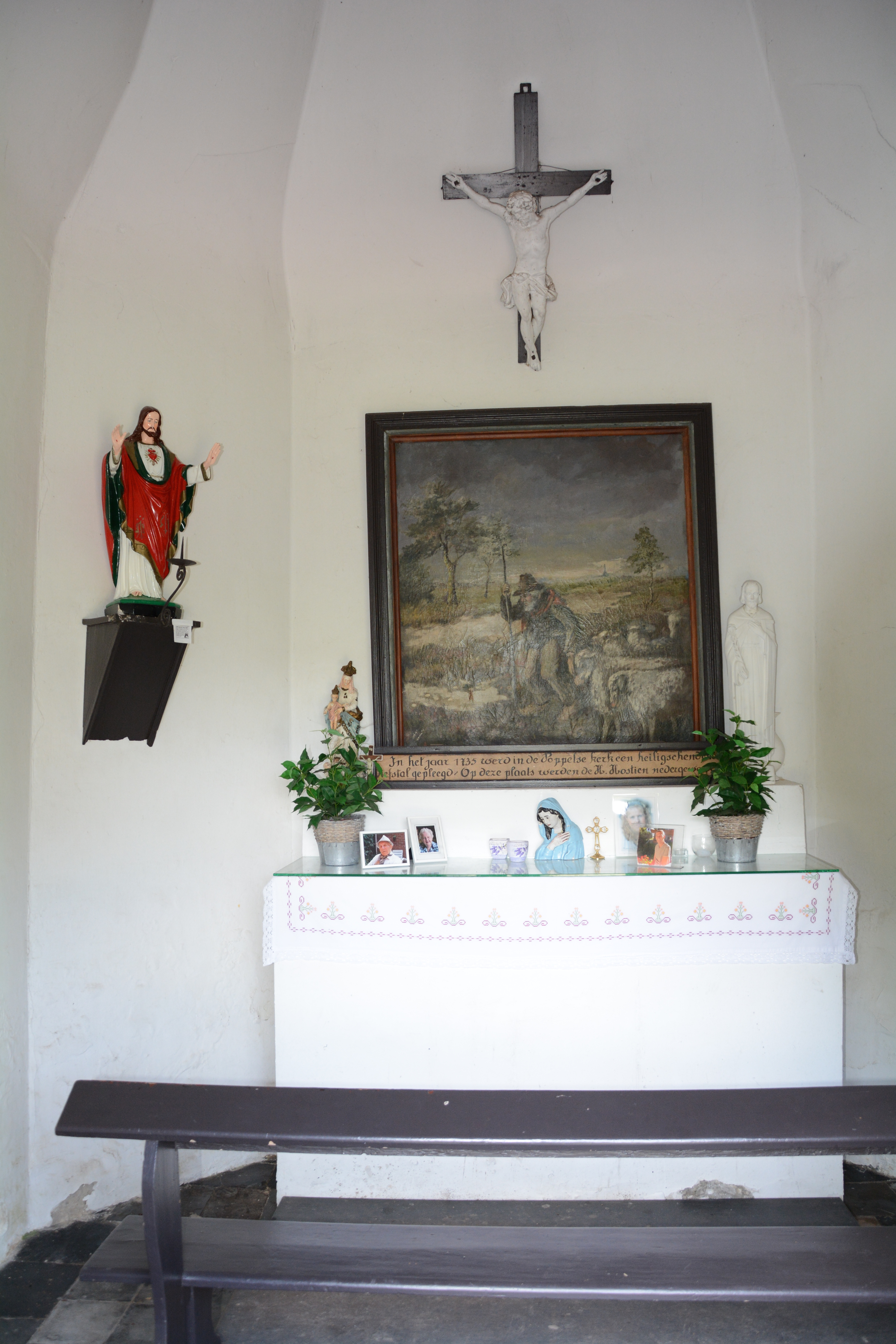 Interieur Rovertkapel, Ravels